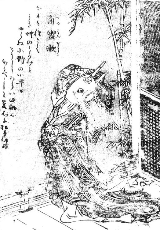 Tsuno-hanzō (角盥漱) from the Gazu Hyakki Tsurezure Bukuro (百器徒然袋)